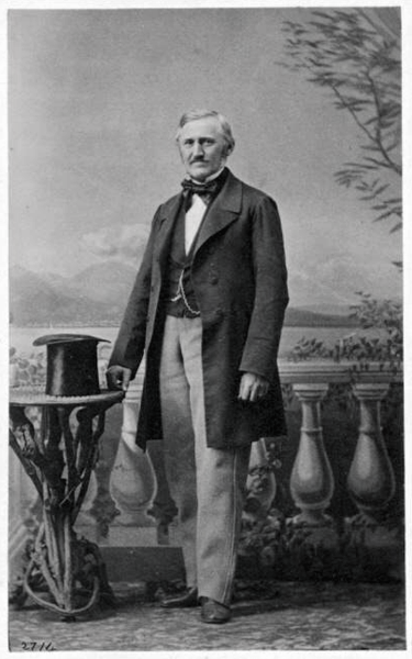 Federico Alberto Wenner (San Gallo, 1812 – Capezzano, 1882) imprenditore svizzero del Regno delle Due Sicilie.